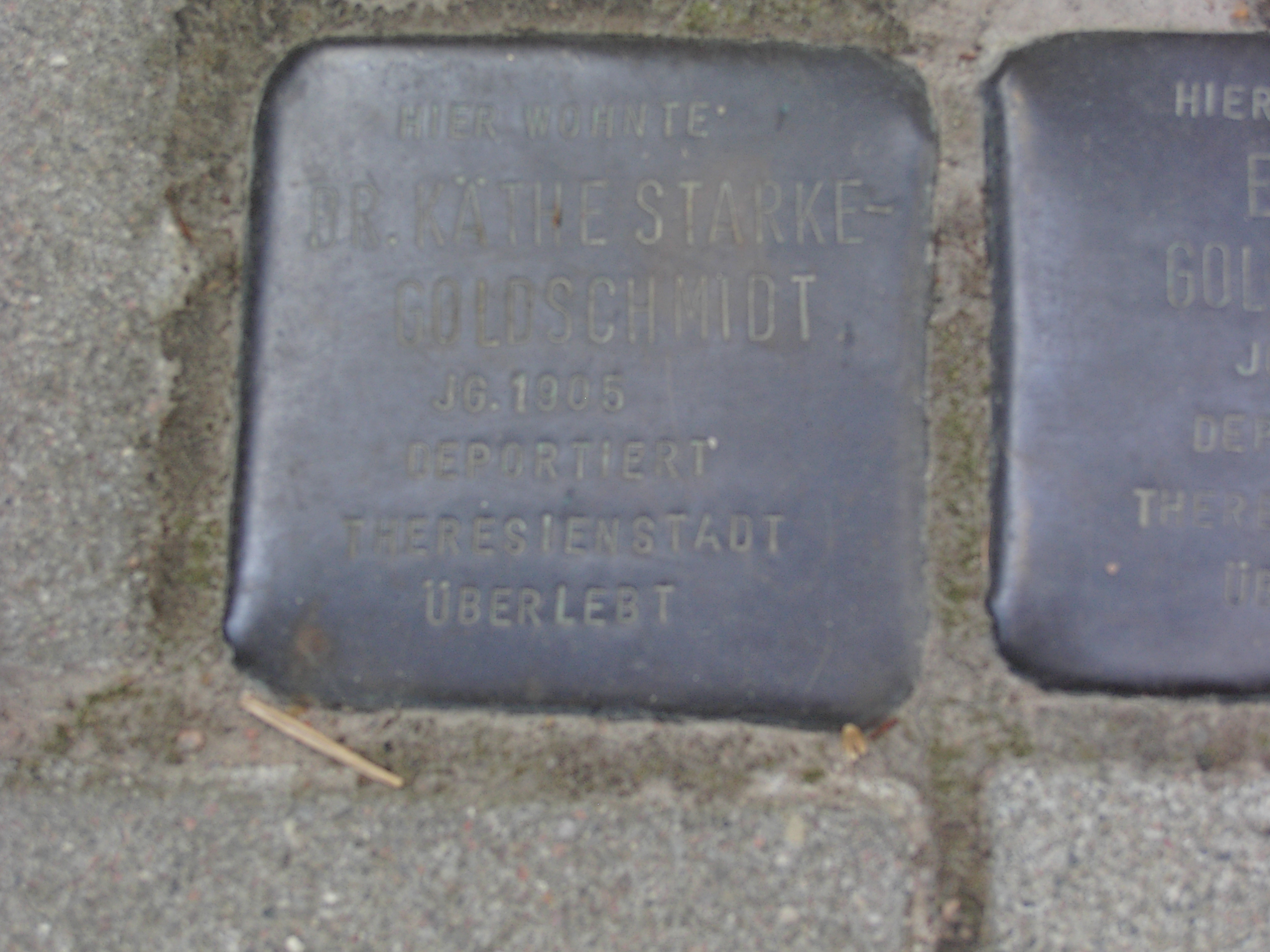 Stolperstein in Hamburg-Othmarschen: Käthe Goldschmidt-Starke, (27.9.1905 in Altona - 10.8.1990 in hamburg), deportiert nach Theresienstadt am 23.6.1943, befreit am 8.5.1945